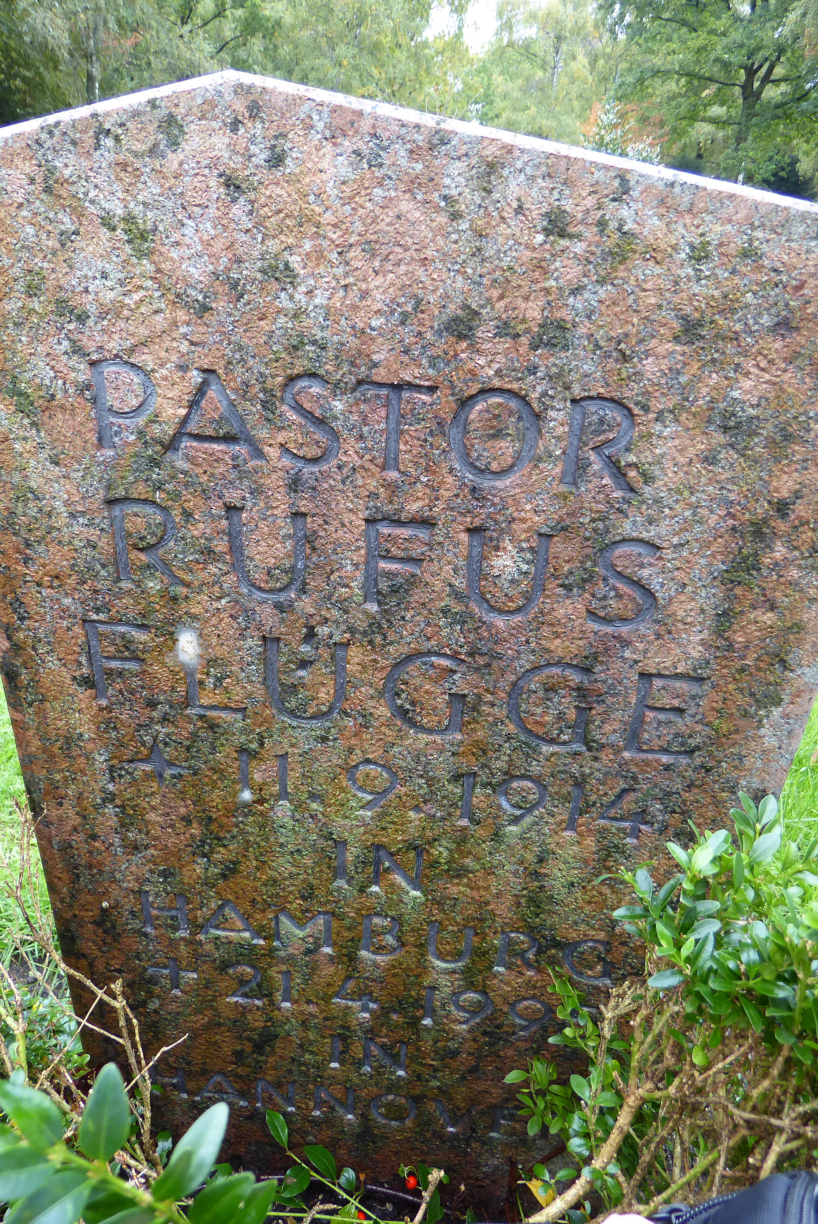 Grabstätte von Rufus Flügge, Stadtsuperintendent i. R. von Hannover, auf dem Stadtteilfriedhof Hannover-Kirchrode, Am Döhrbruch 55.